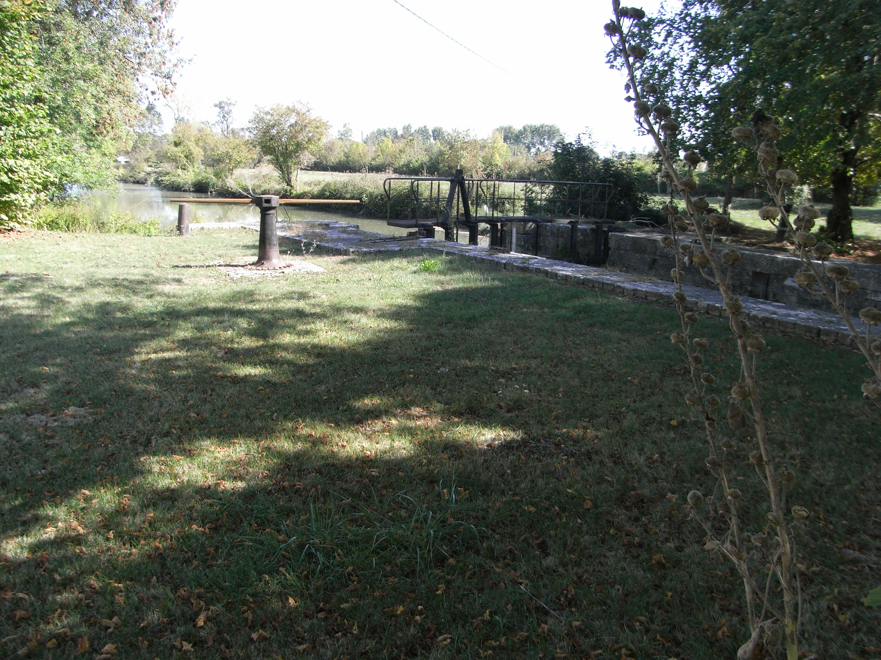 Écluse sur la Boutonne située à Bel-Ébat en Charente-Maritime (France).